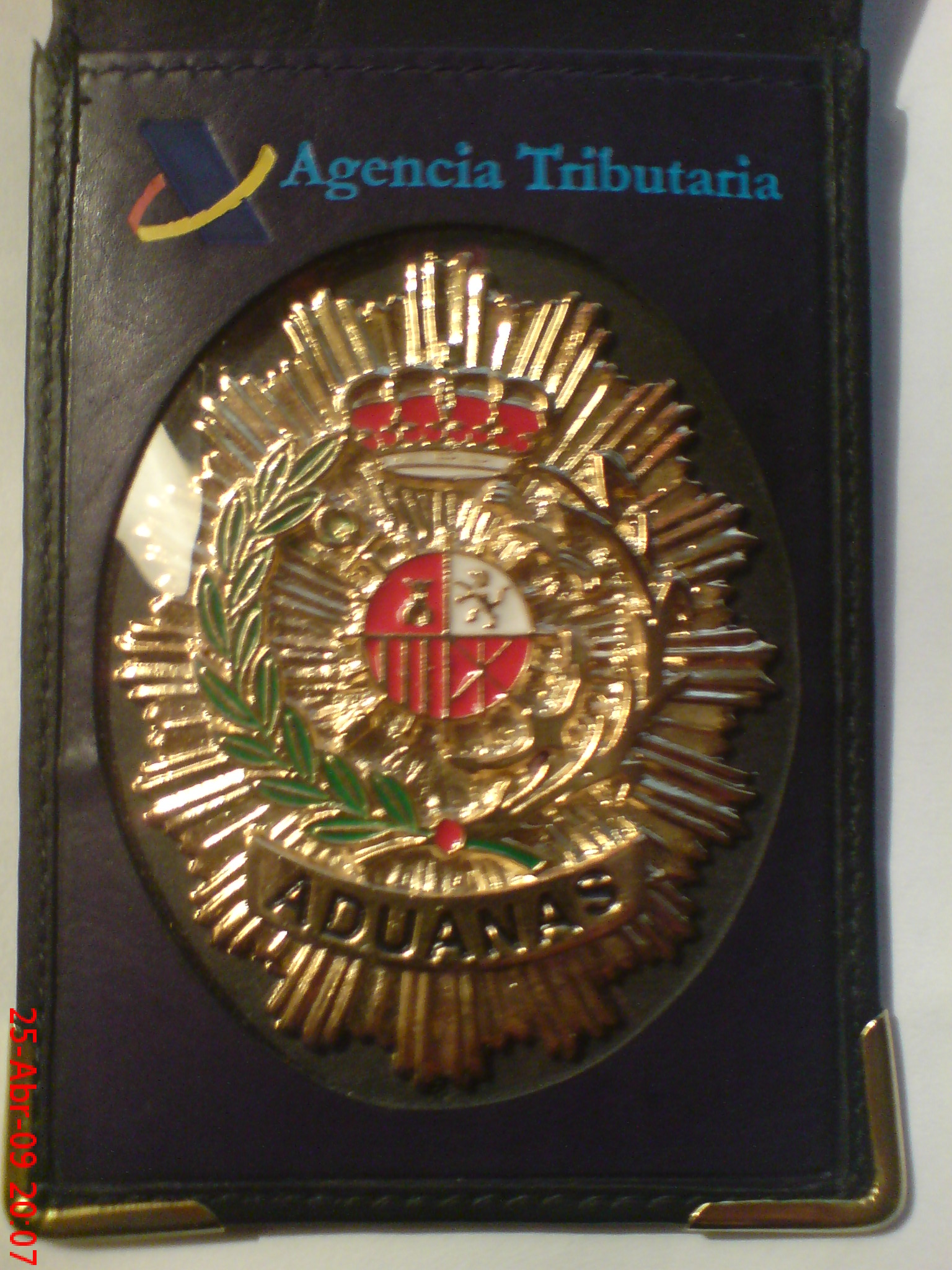 cartera portatarjeta oficial de identidad profesional